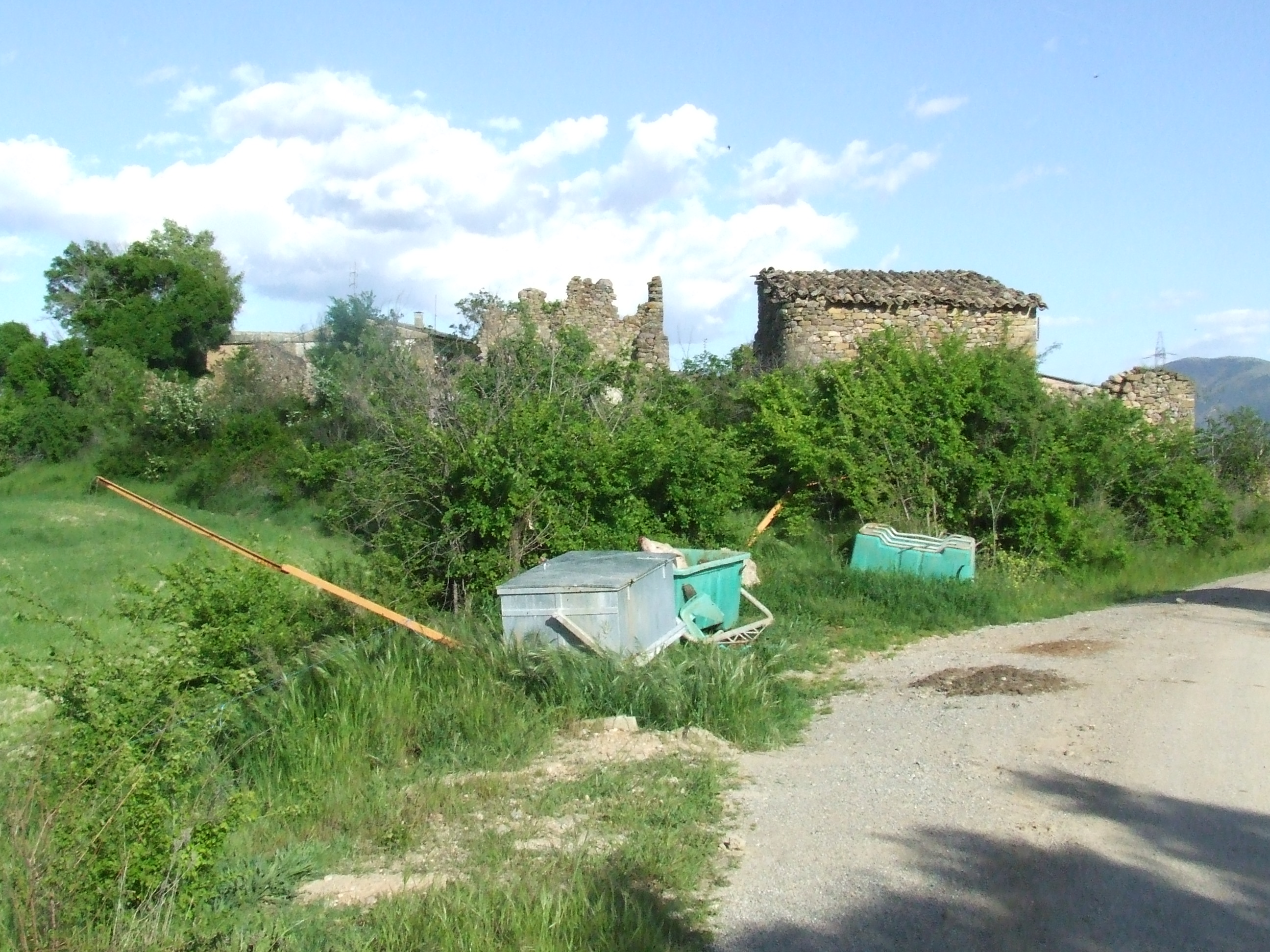 El poble abandonat de Sensui (Salàs de Pallars, Pallars Jussà)